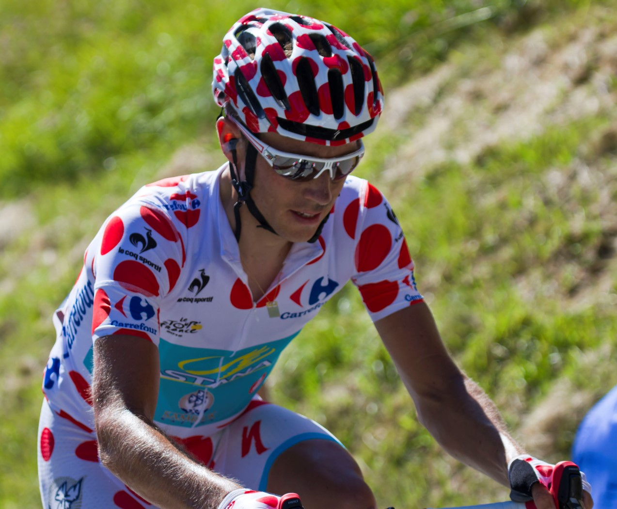 101 kessiakoff